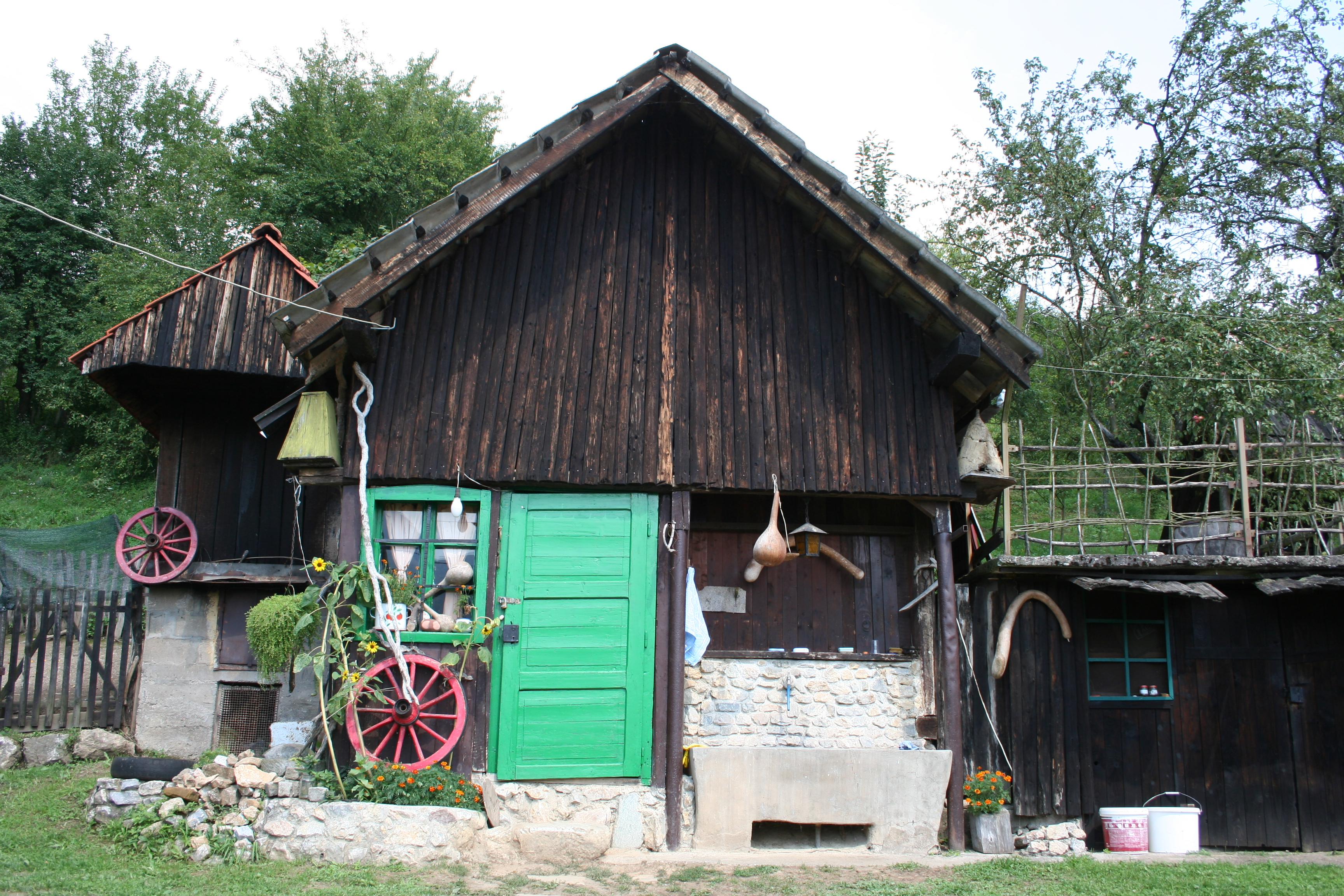 Seosko domaćinstvo, Culine